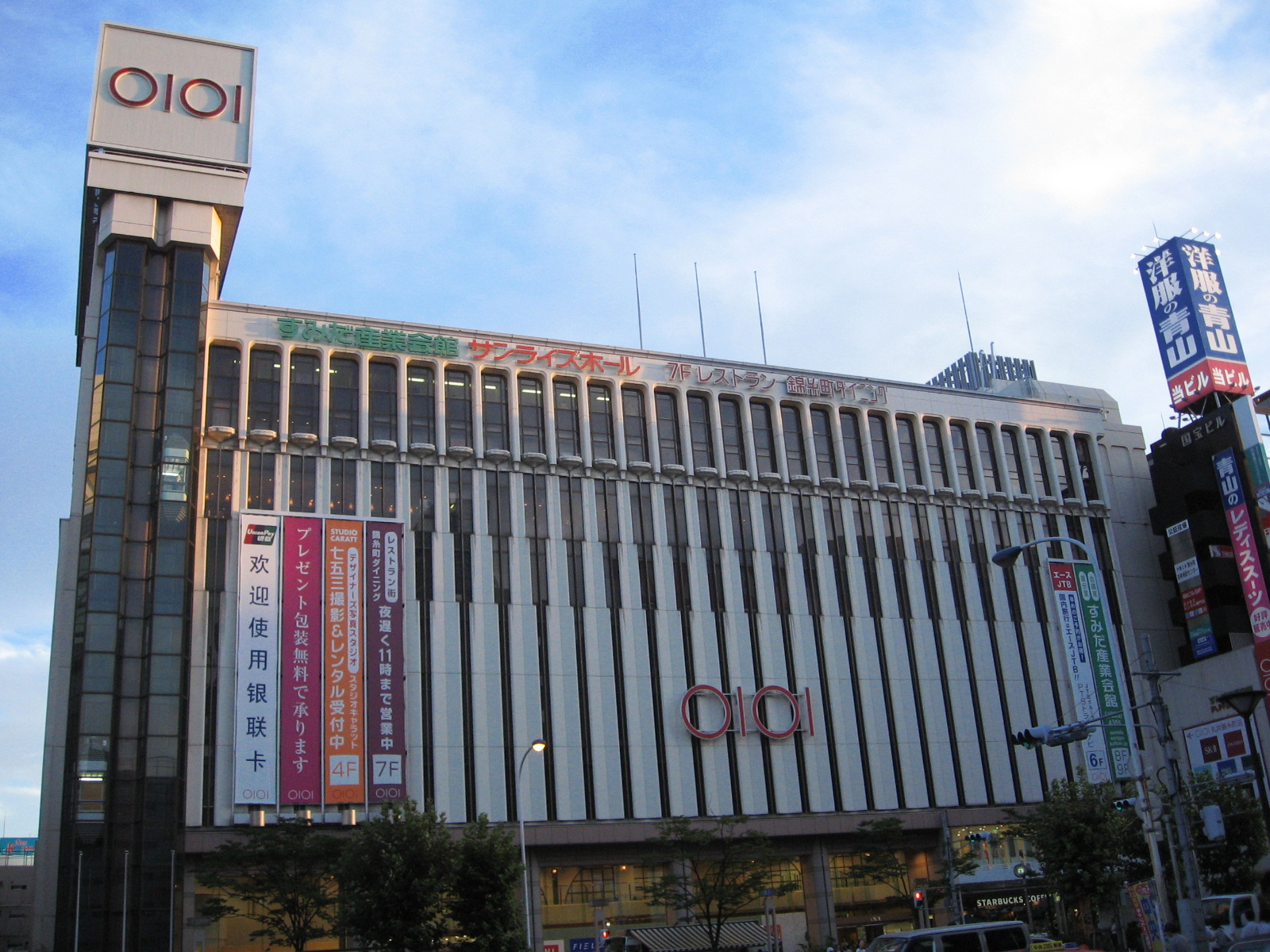 Marui Kinshicho.